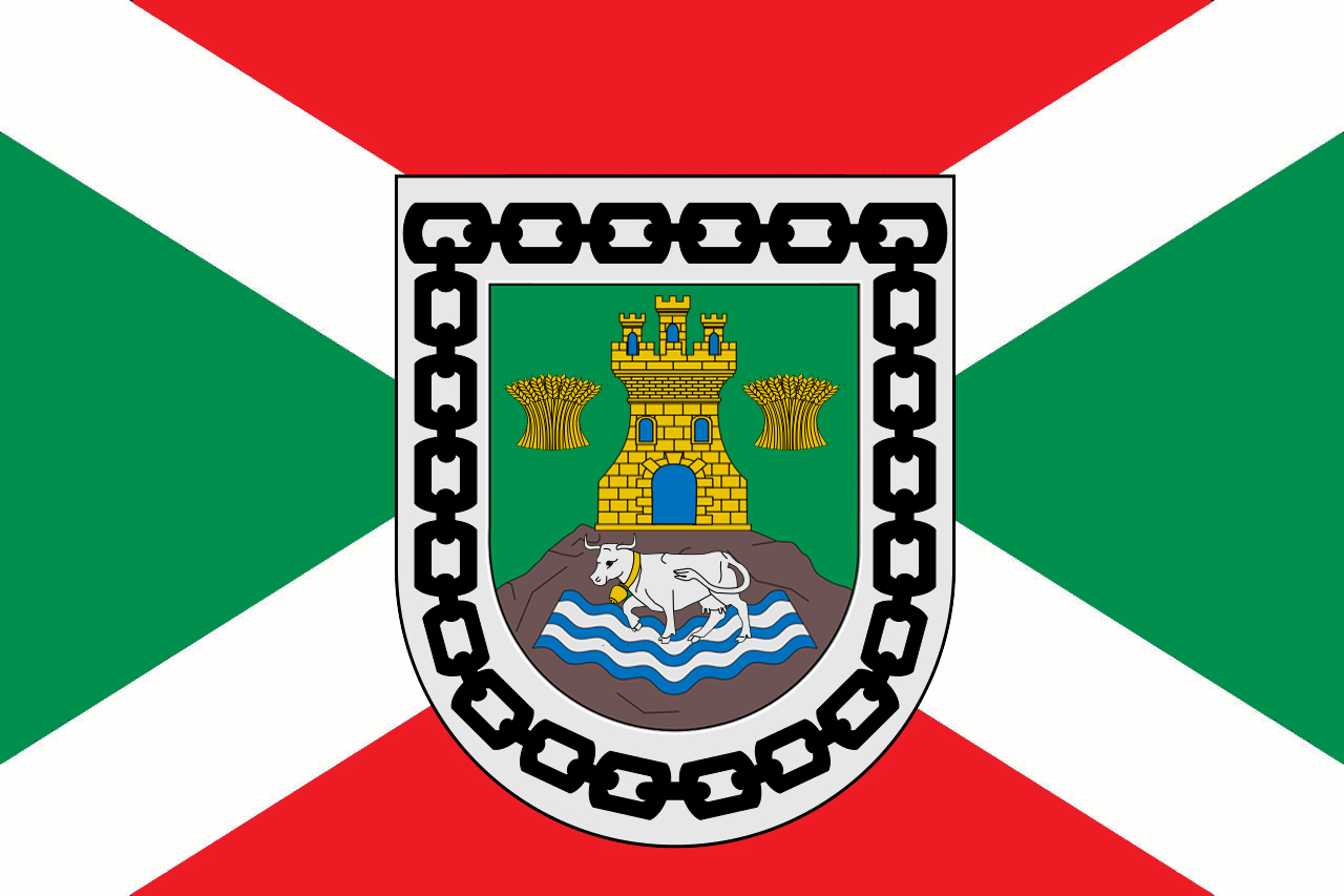 Bandera de Riaño Valle de Valdebezana